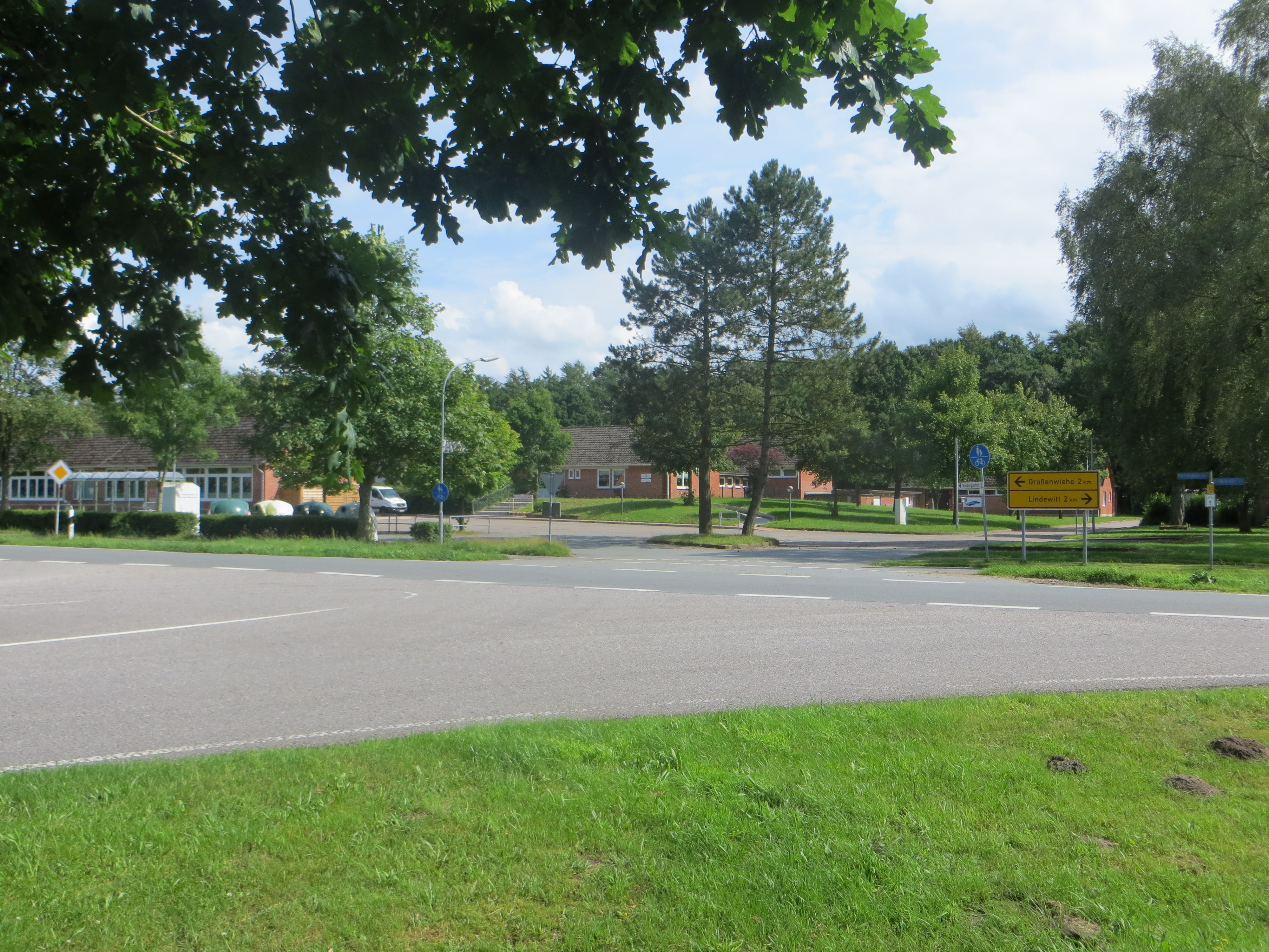 Schule im Wald bei Lindewitt, Kreuzung nach Lüngerau, Großenwiehe und Lindewitt